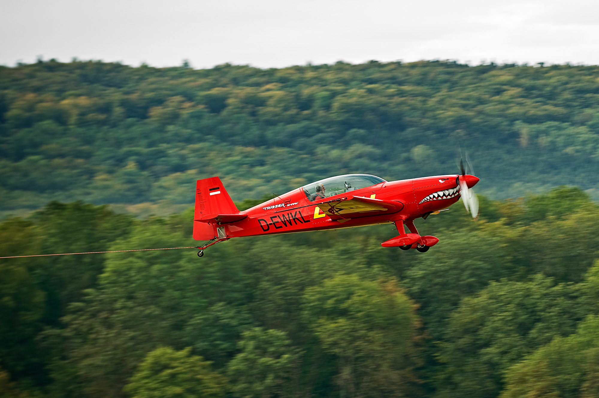 Klaus Lenhart mit seiner Extra 300L, im Einsatz als Schleppflugzeug für Segelflieger bei der OTT 2011.